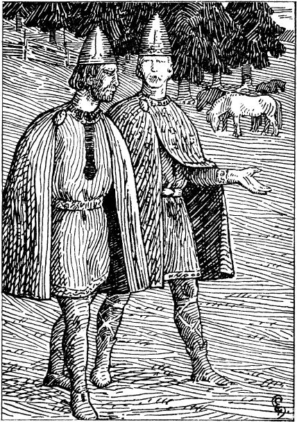 Halfdan Egedius: Illustration for Olav Trygvasons saga. Snorre 1899-edition. «Kong Olav søger at overtale Haarek.» nb: «Kong Olav prøver å overtale Hårek.» nn: «Kong Olav prøver å overtale Hårek.»